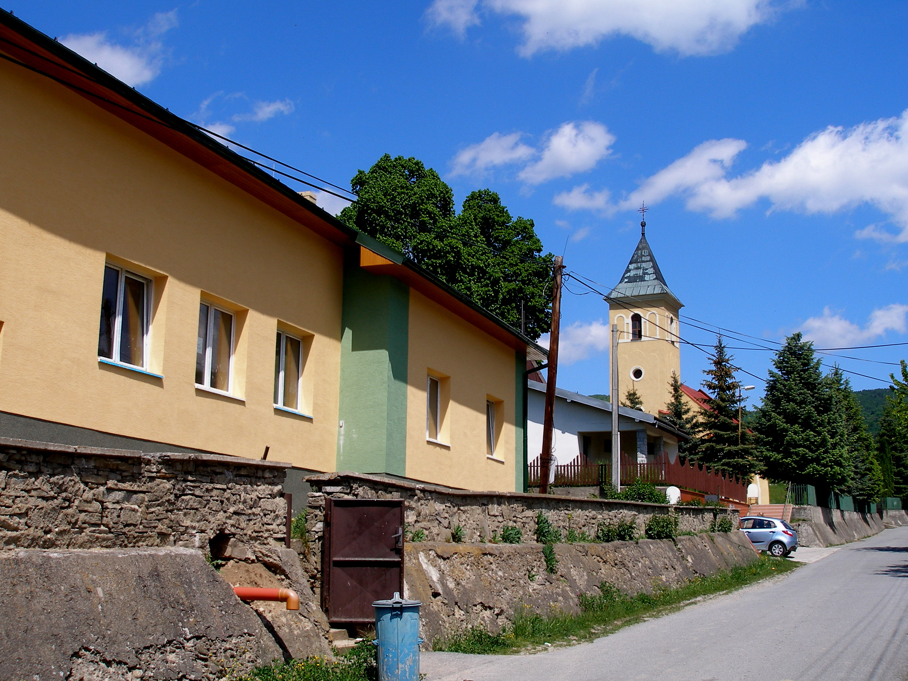 Obec Milpoš okres Sabinov.